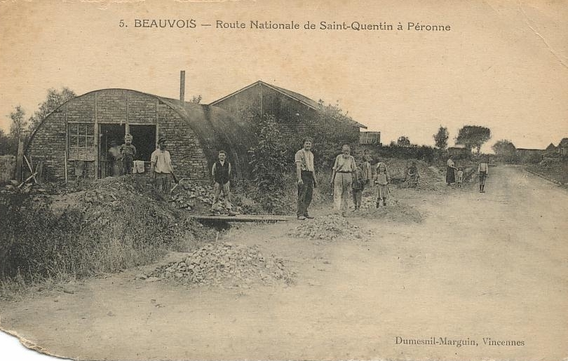 Les "tubes" provisoires en 1919